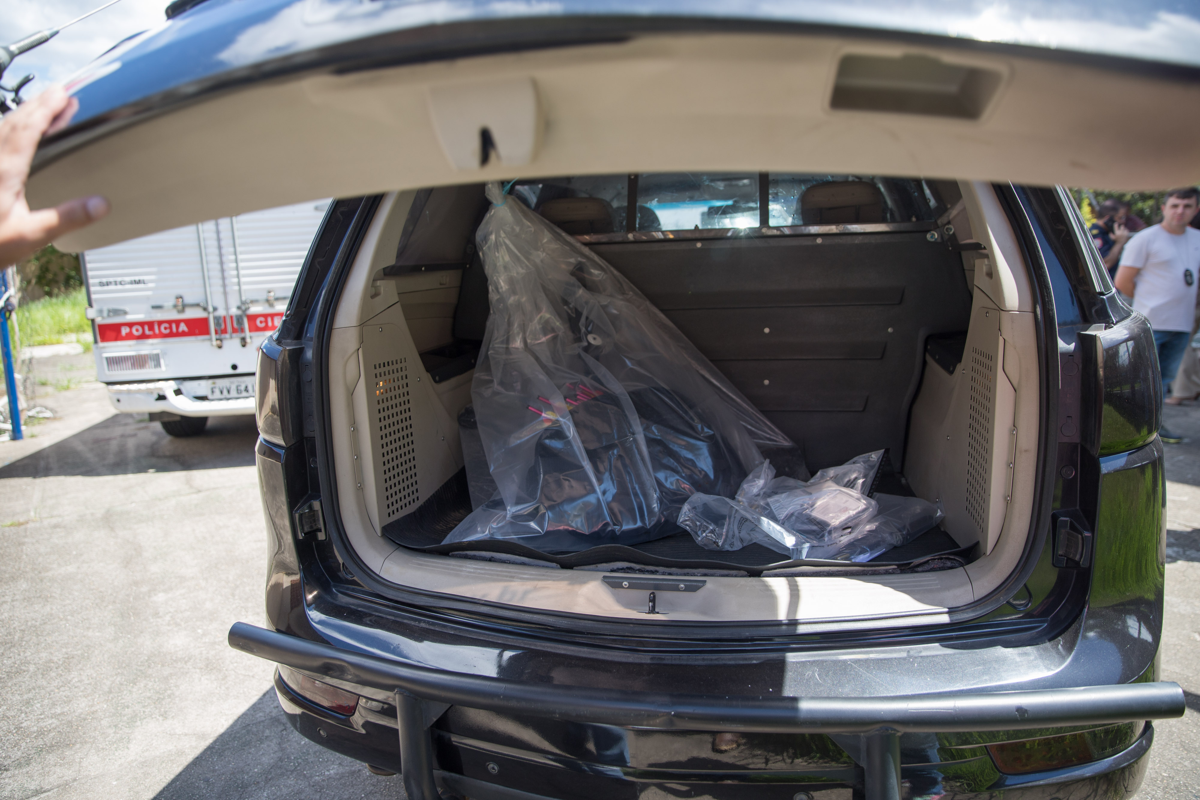 Secretários da Segurança Pública, participam de coletiva de imprensa na Escola Raul Brasil. Local: São Paulo/SP.Data: 13/03/2019 Foto: Governo do Estado de São Paulo